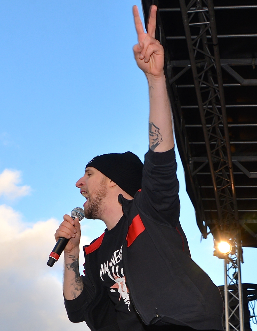 Demonstration för mångfald, mot rasism och fascism anordnad av Linje 17 i Kärrtorp 22 december 2013.